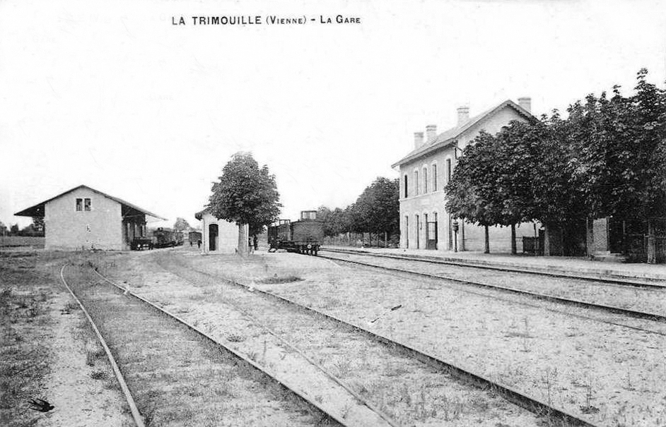 Intérieur de la halte, avec les voies, le bâtiment voyageurs et la halle à marchandises vers 1900.